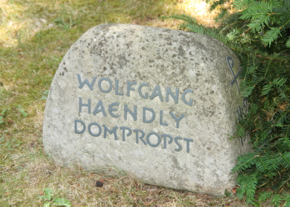 Grabstein Wolfgang Haendly auf dem Hedwigsfriedhof Berlin-Reinickendorf